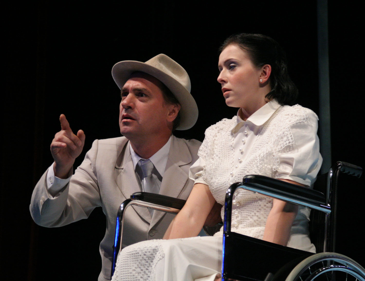 Сцена из спектакля Саратовского академического театра драмы «Чайка». Актёры Игорь Баголей и Зоя Юдина.